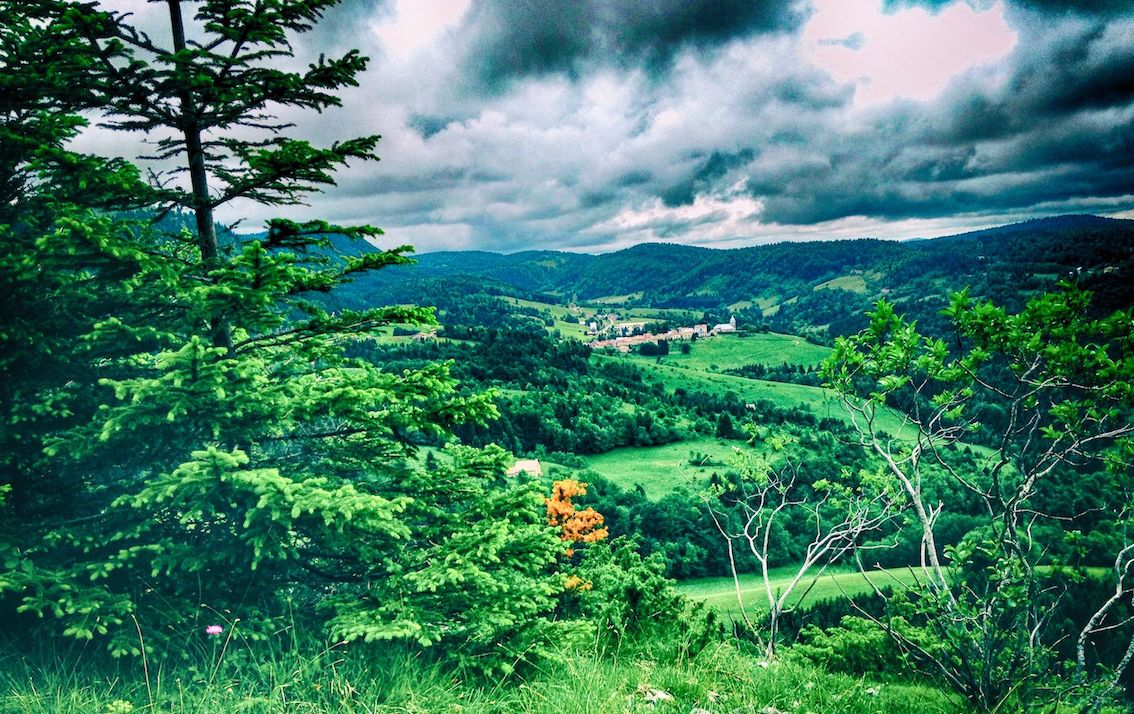 photo